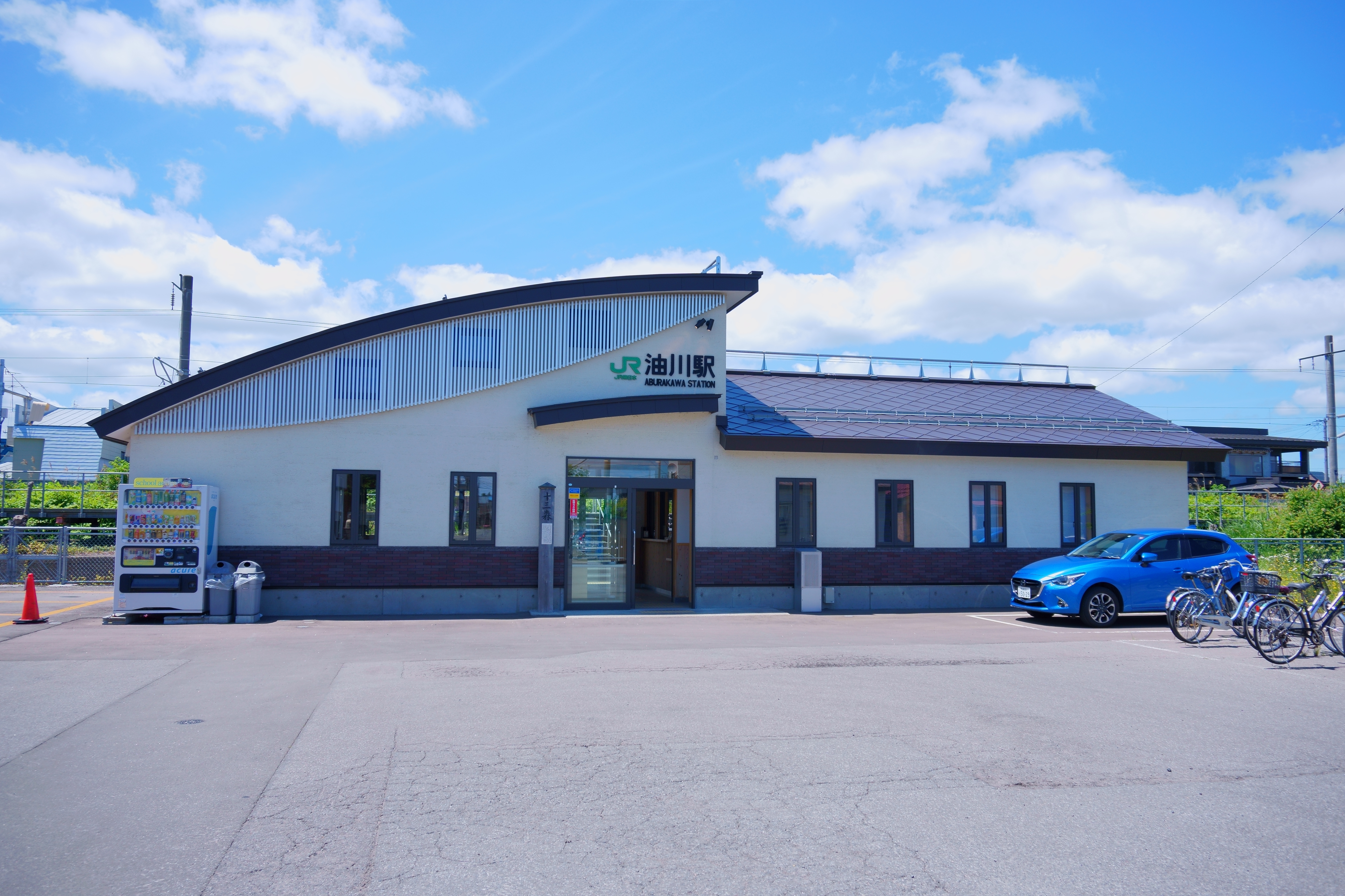 津軽線 油川駅（青森県青森市）